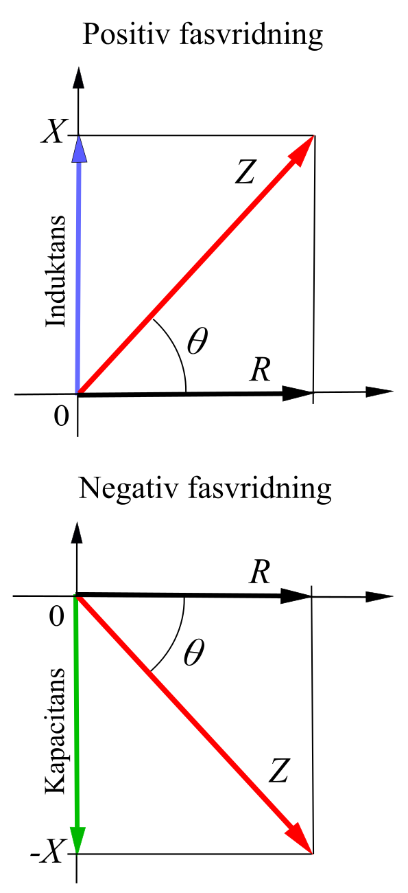 Reaktanser